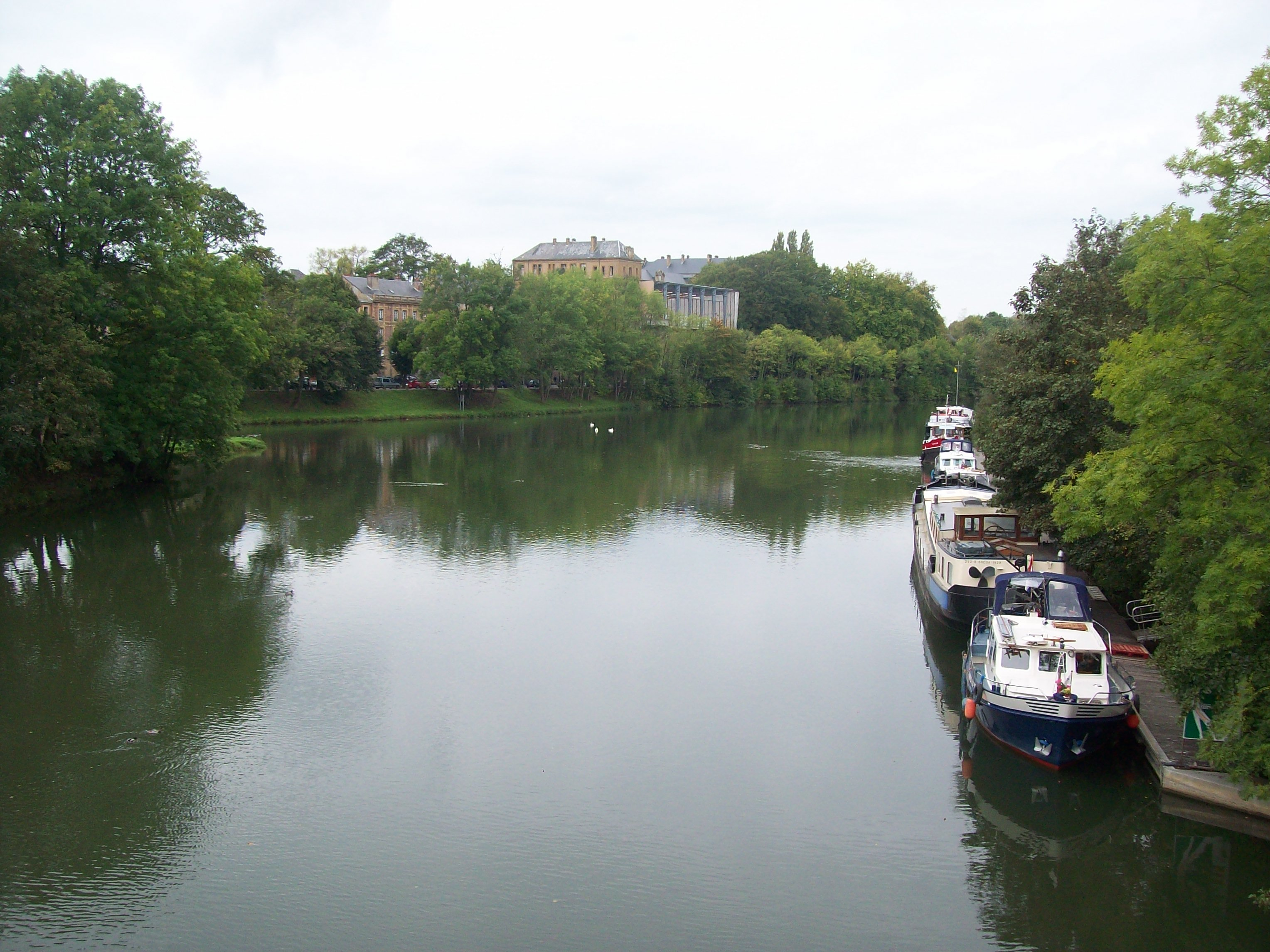 Ville: Charlevile-Mézières Région: Champagne-Ardenne Pays: France